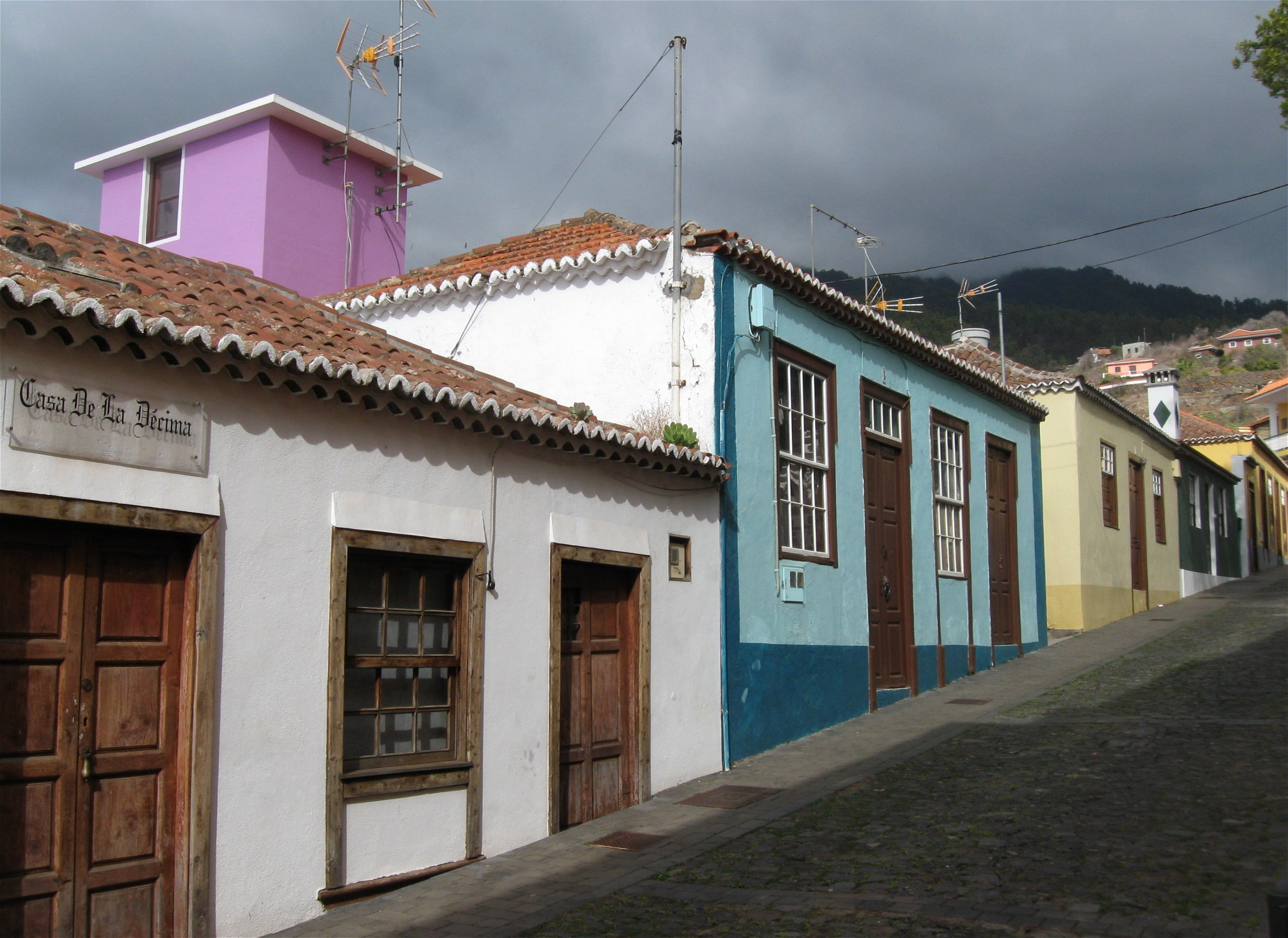 Calle la Luz, Tijarafe, La Palma